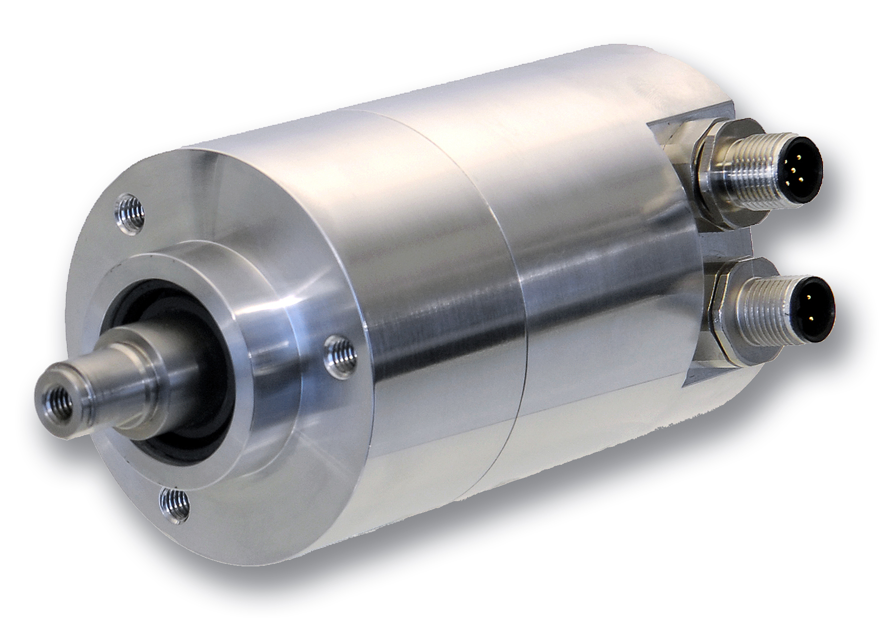 TWK-Elektronik - Nockenschaltwerk